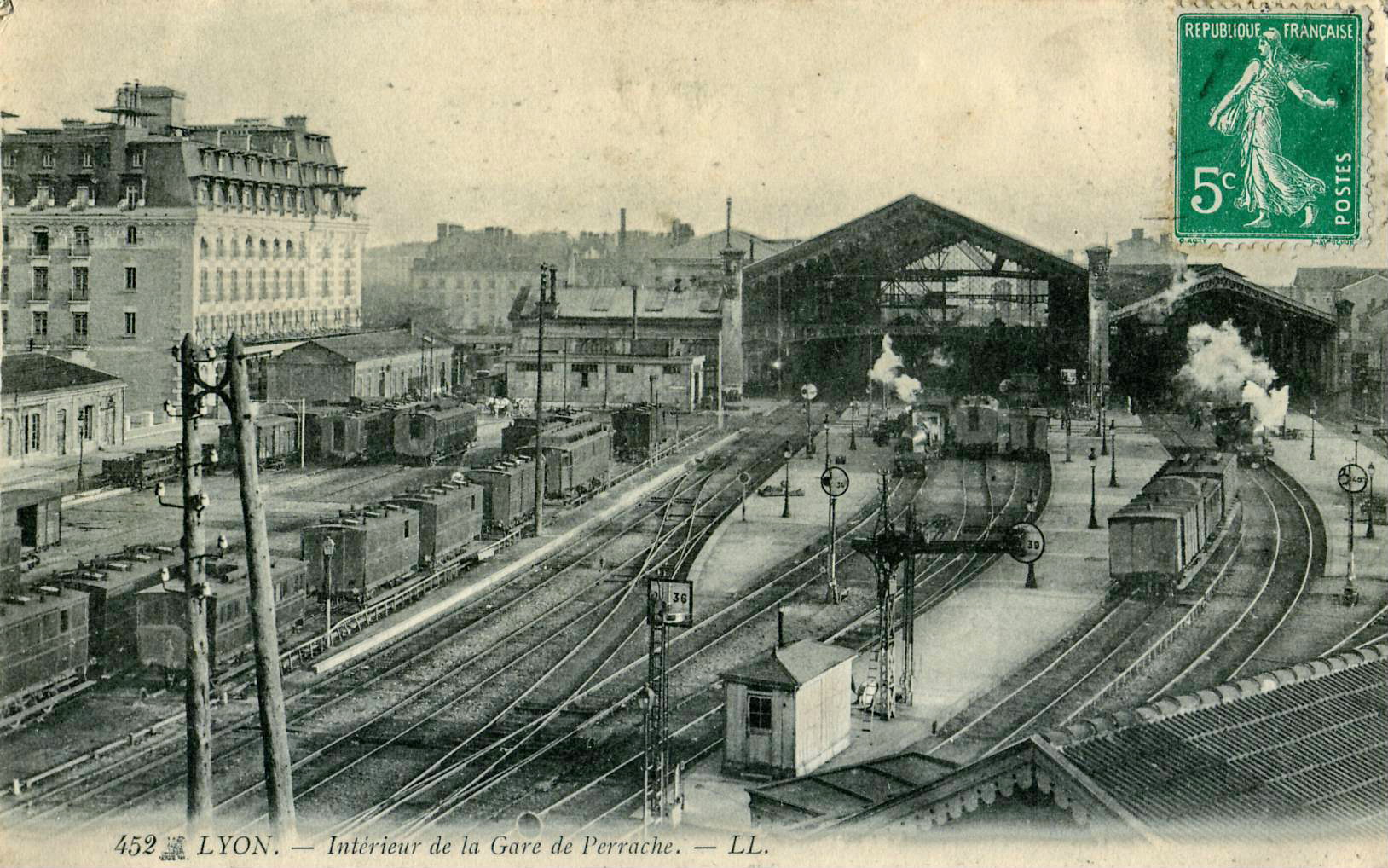 Carte postale ancienne éditée par LL, n°452 :Lyon - Intérieur de la Gare de Perrache